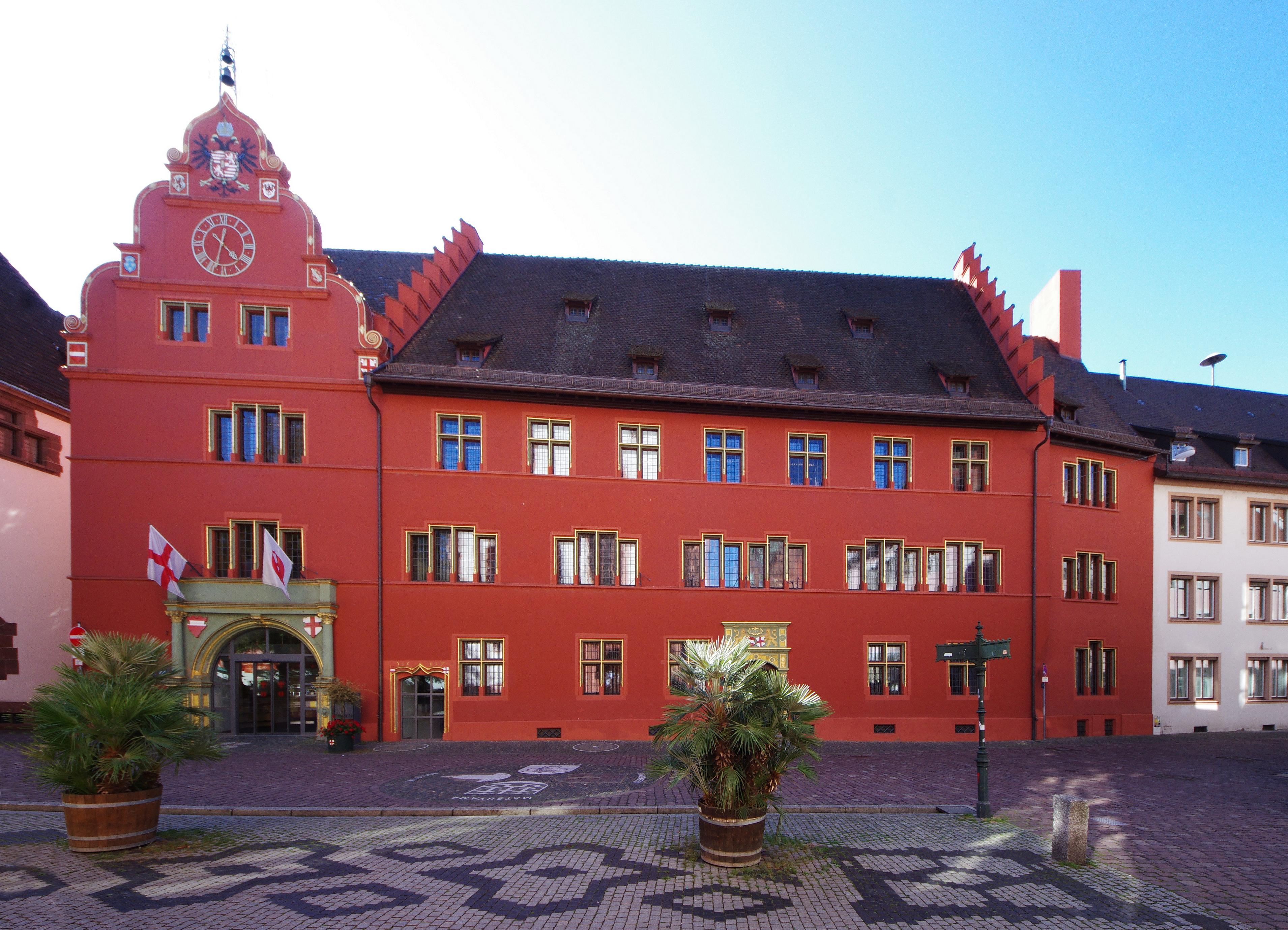 Altes Rathaus in Freiburg Frontansicht